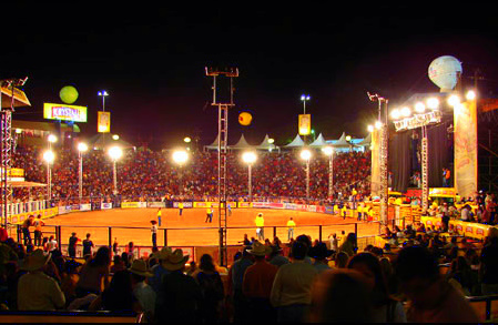 Expo de Fernandópolis